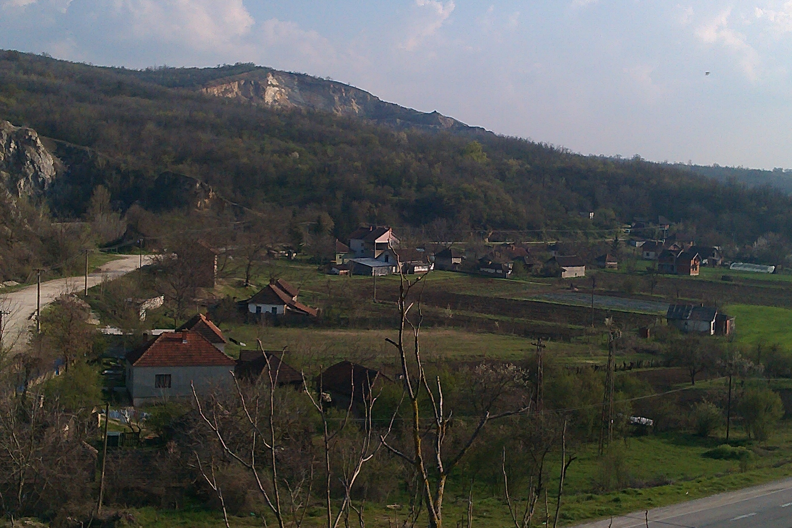 Srpski (latinica): Pogled na Gradac sa Jerininog Brda